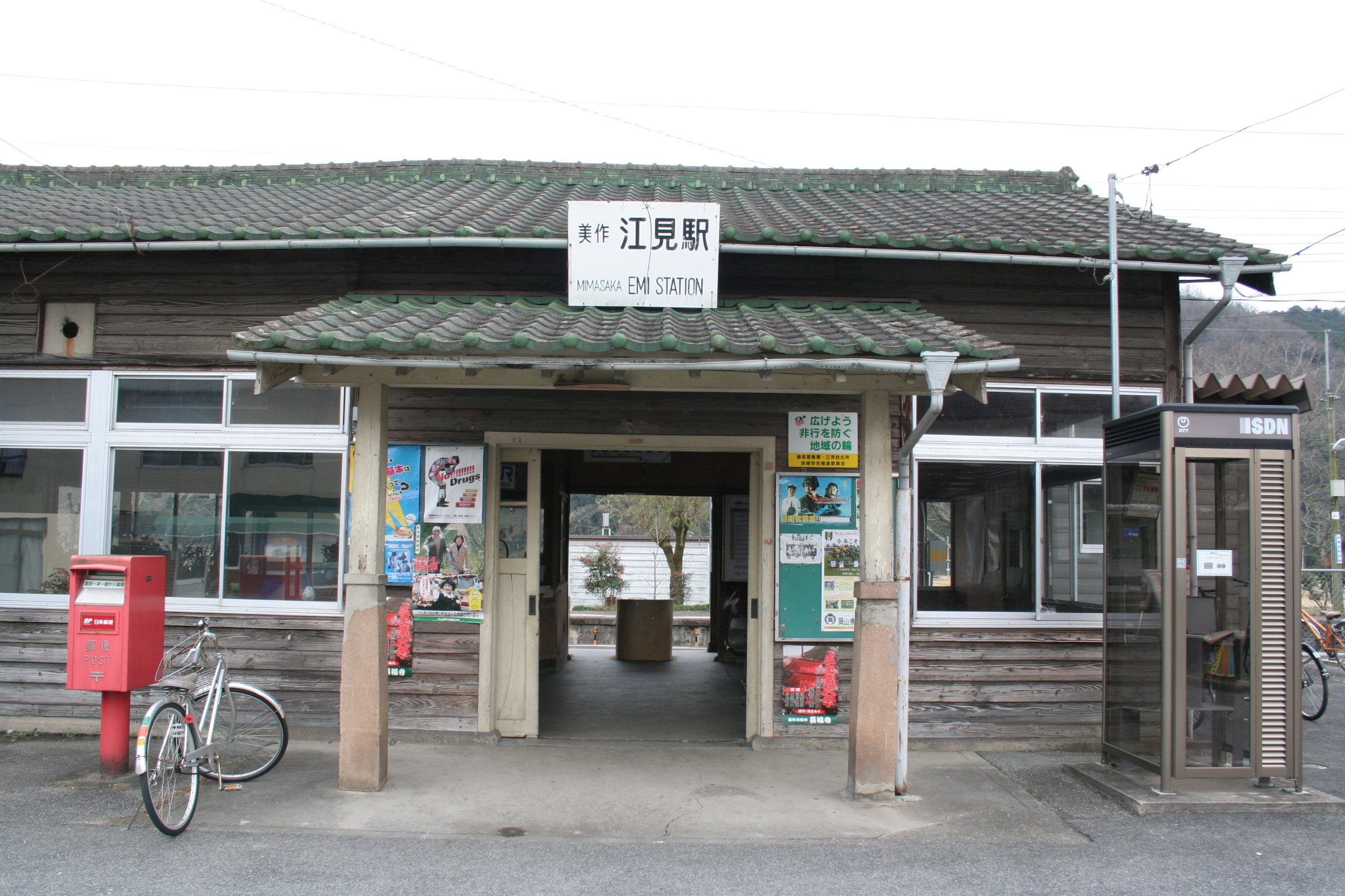 美作江見駅出入り口正面。